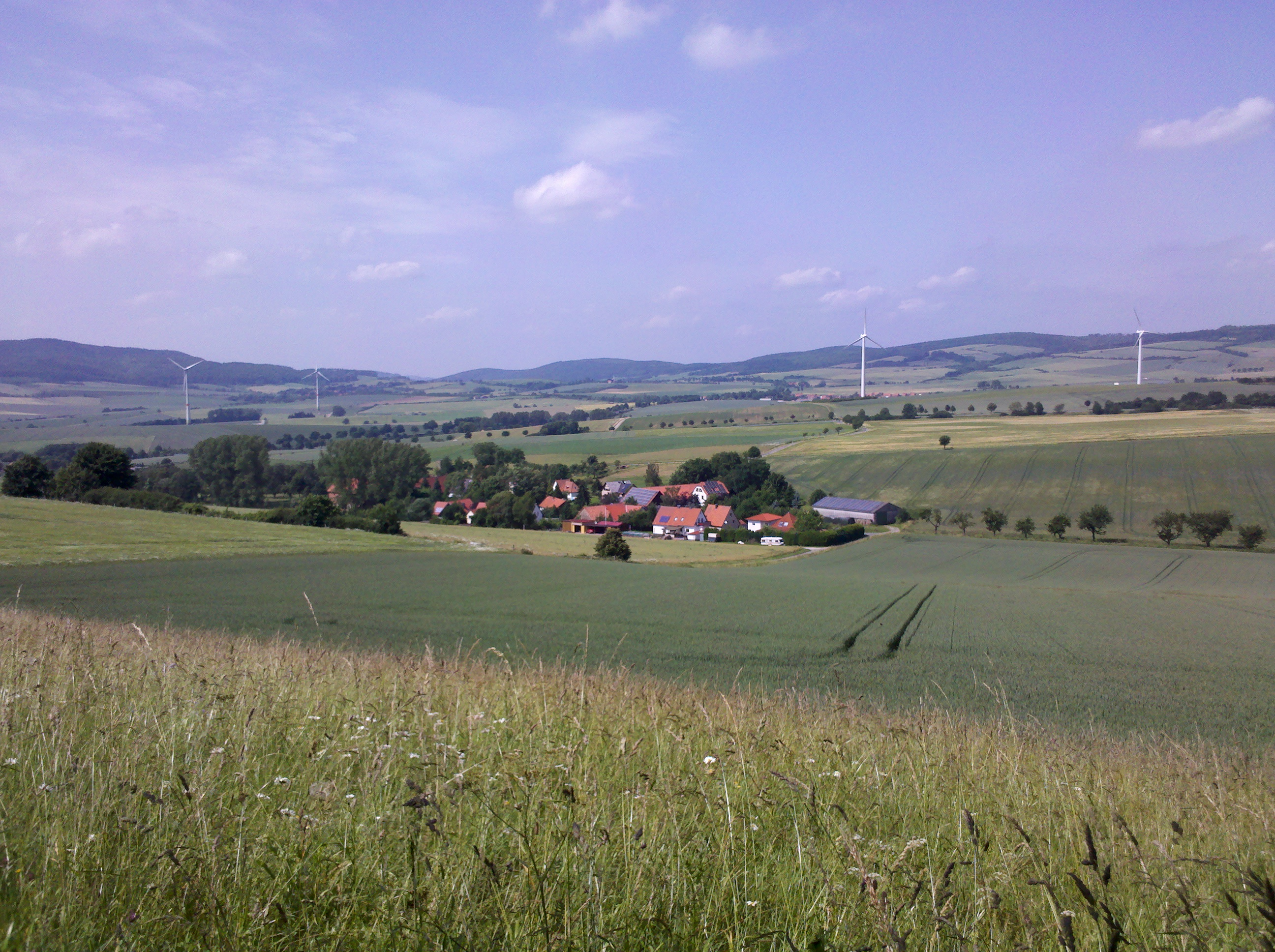 Blick vom Lietberg (bis 287,7 m) über Holtershausen und die Region